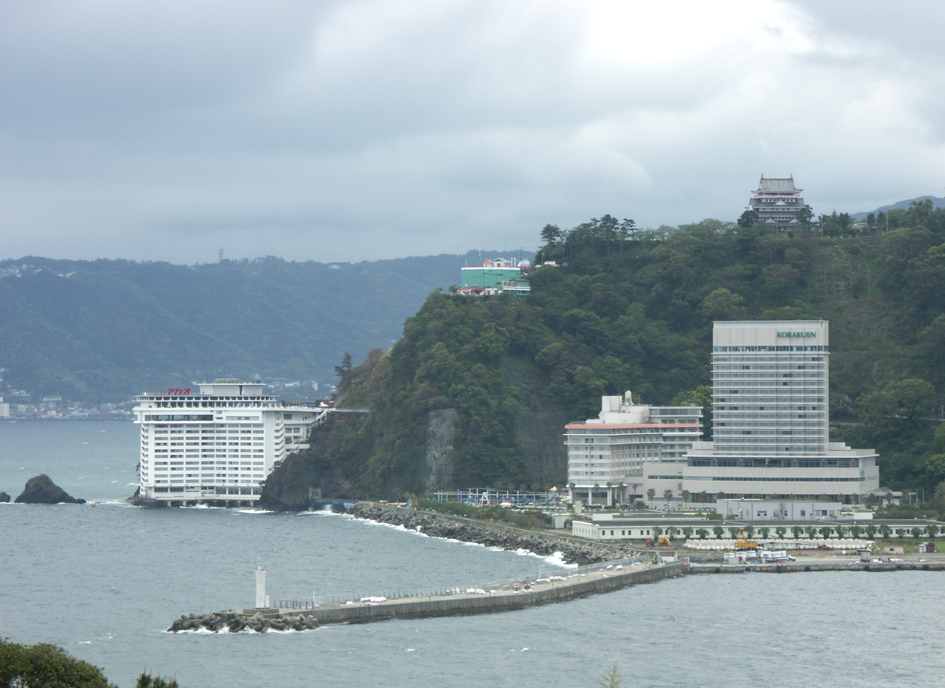 Nishikigaura 錦ヶ浦, Atami City, Shizuoka Pref.